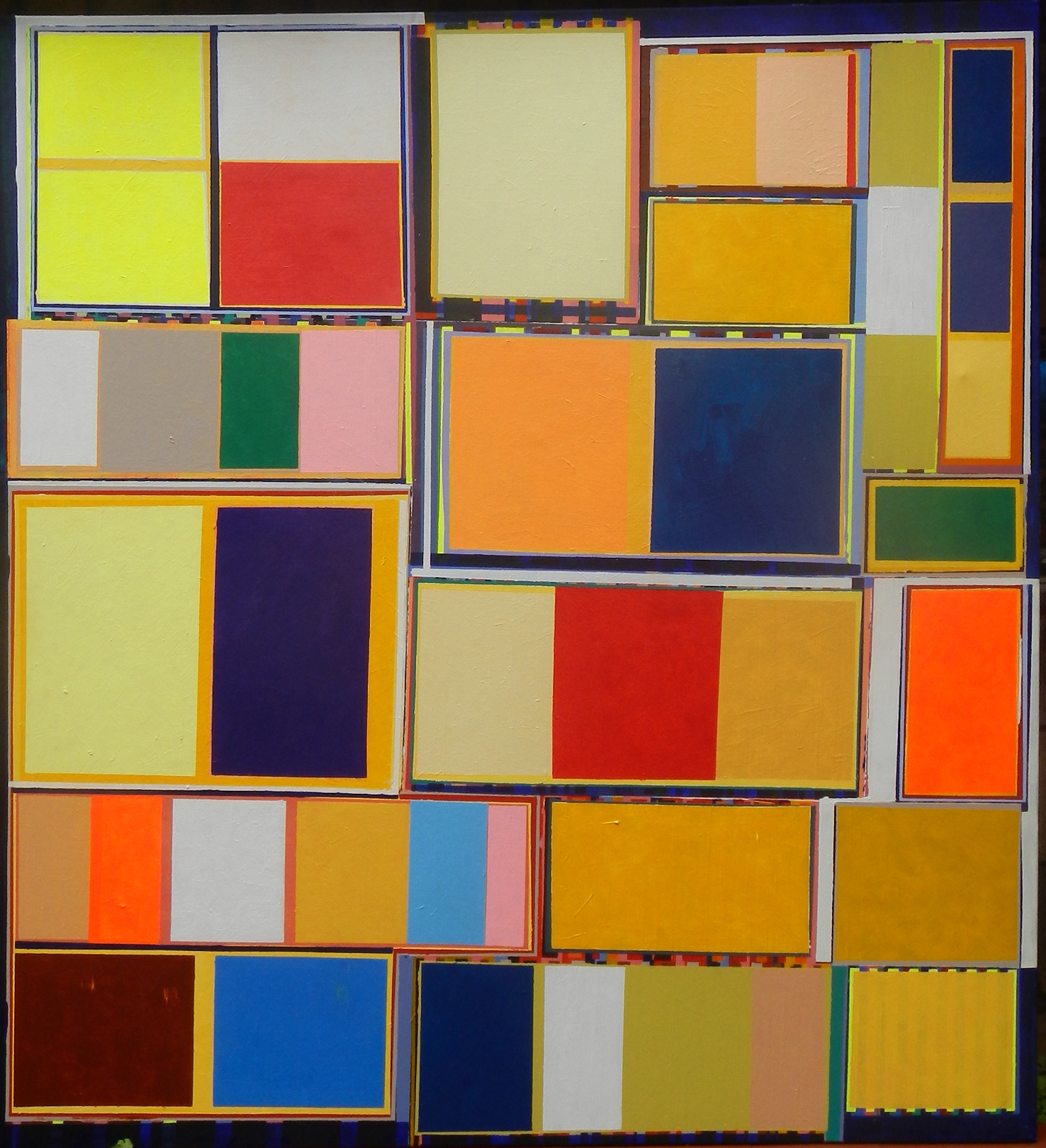 Anagnorisis, Acrylic on canvas, 2013 189cm x 160 cm